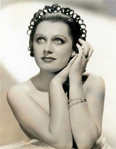 Maxine Reiner